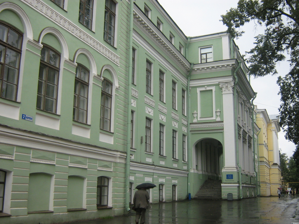 Биофак РГПУ им. А.И. Герцена